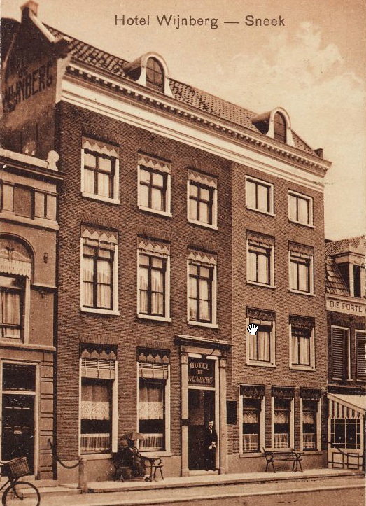 Hotel De Wijnberg in Sneek